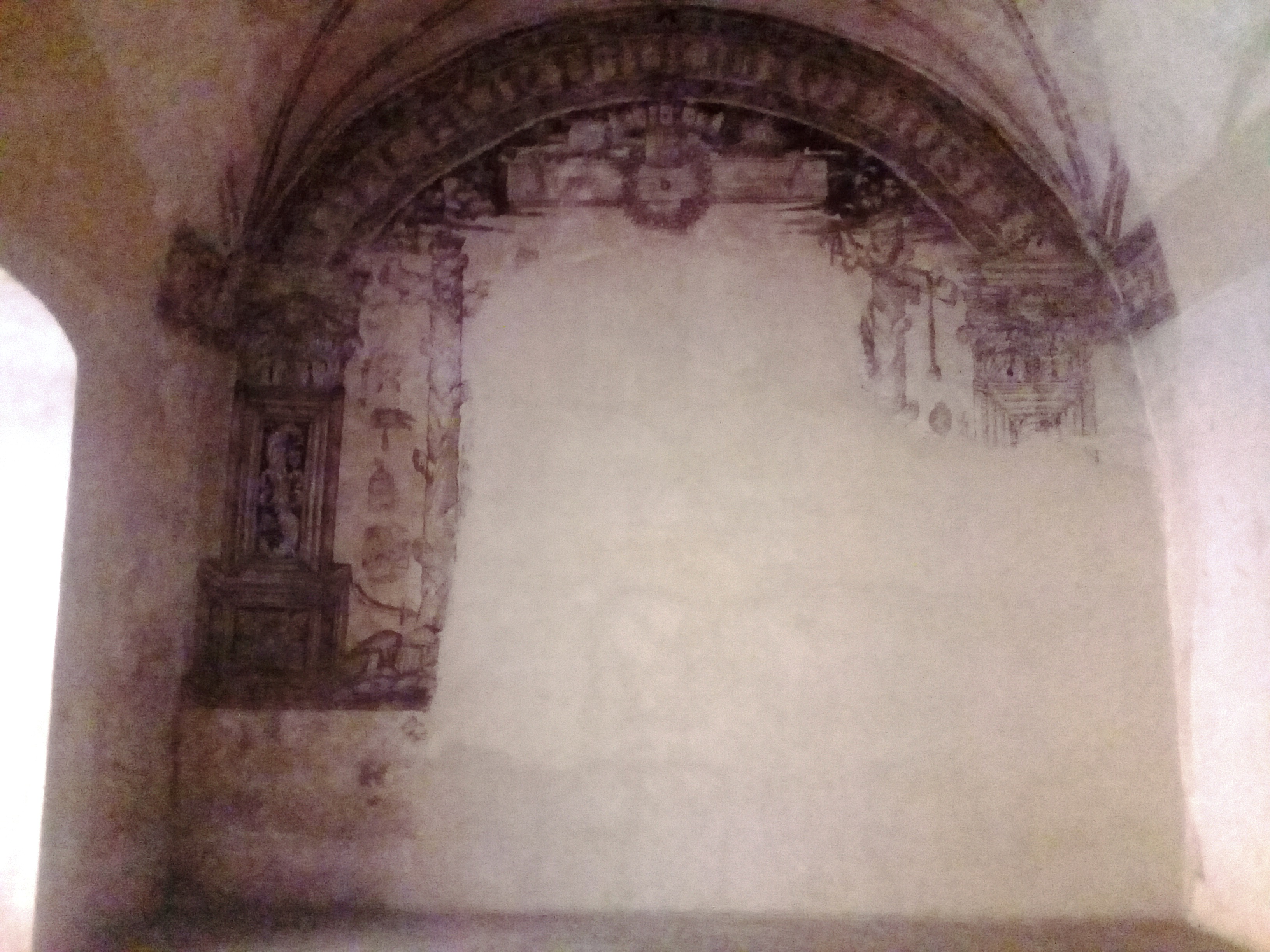 Templo y exconvento de San Nicolás de Tolentino (Actopan).